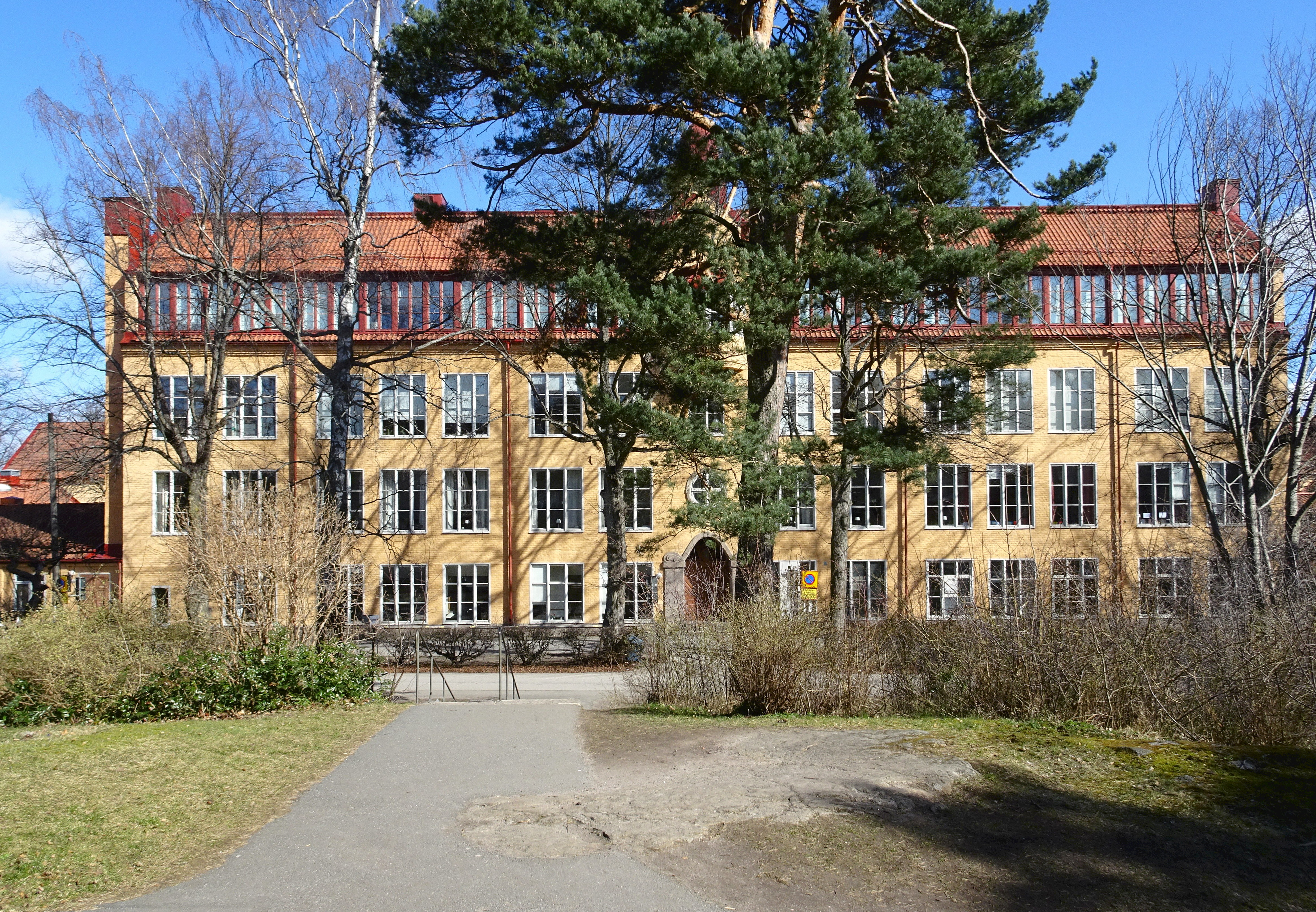 Enskede skola, byggår 1915, arkitekt Georg A. Nilsson